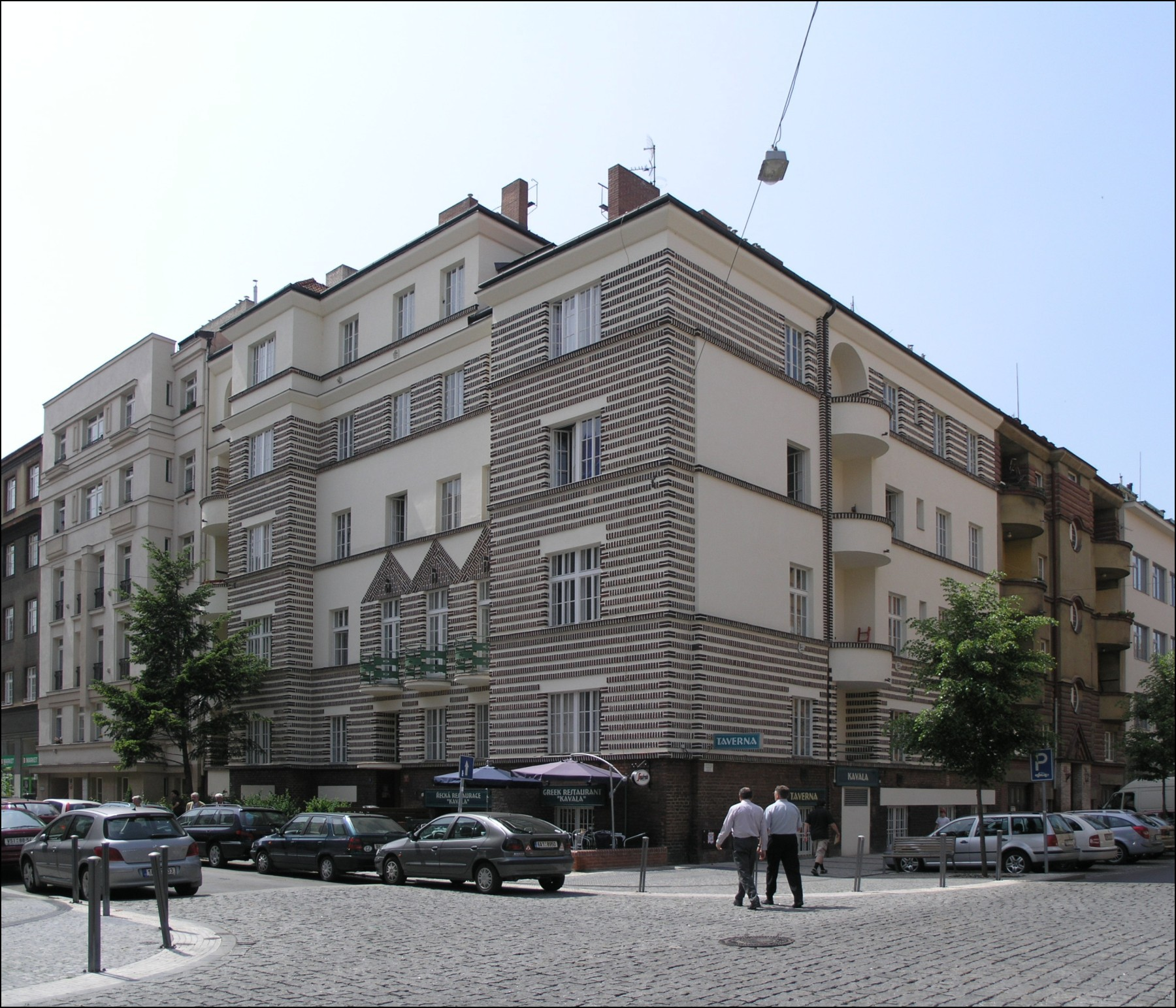 Praha, Bubeneč, nároží Charlese de Gaulla - Verdunská